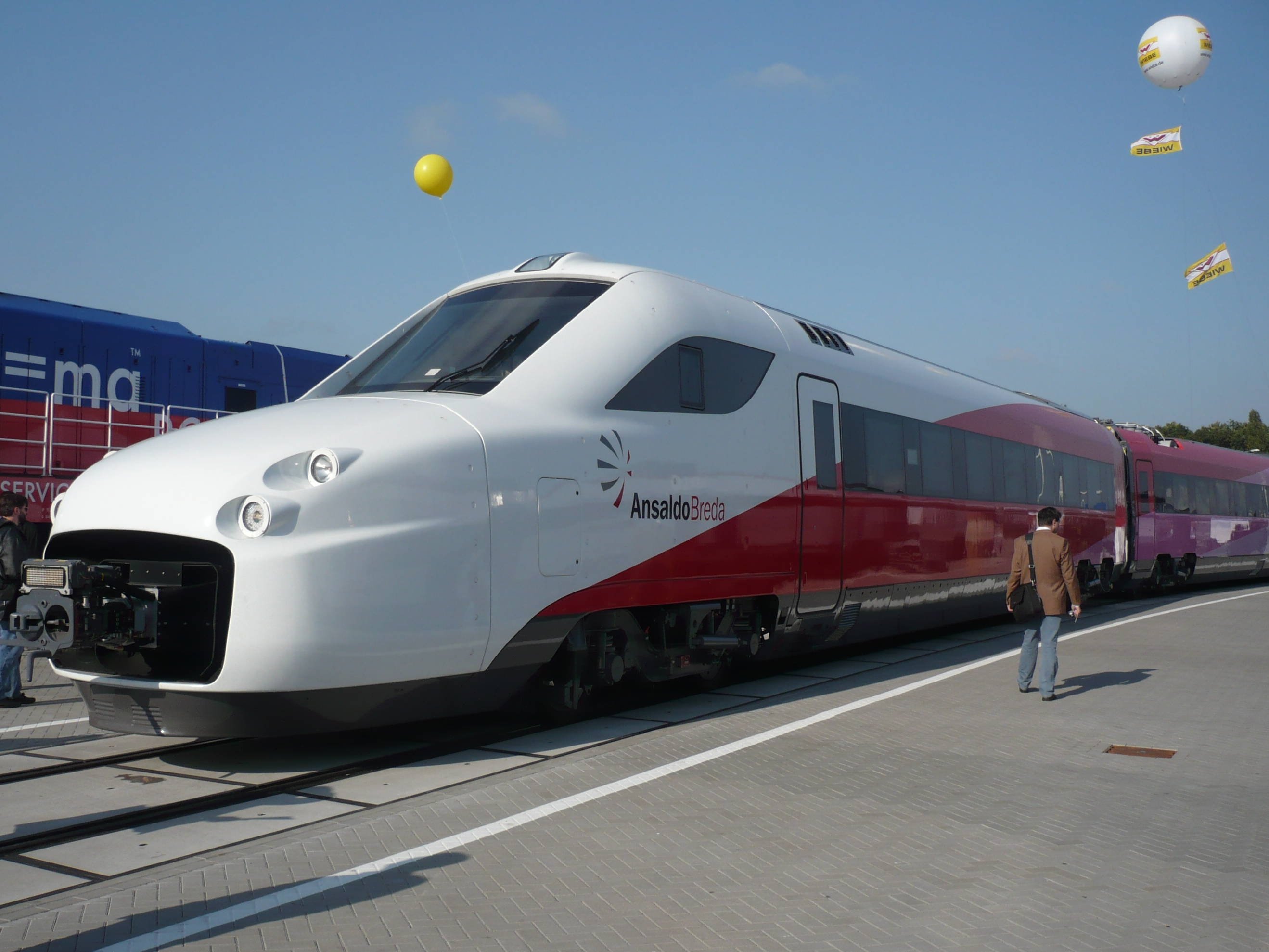 Hochgeschwindigkeitszug der ital. Firma AnsaldoBreda auf der Messe Innotrans 2008 in Berlin.